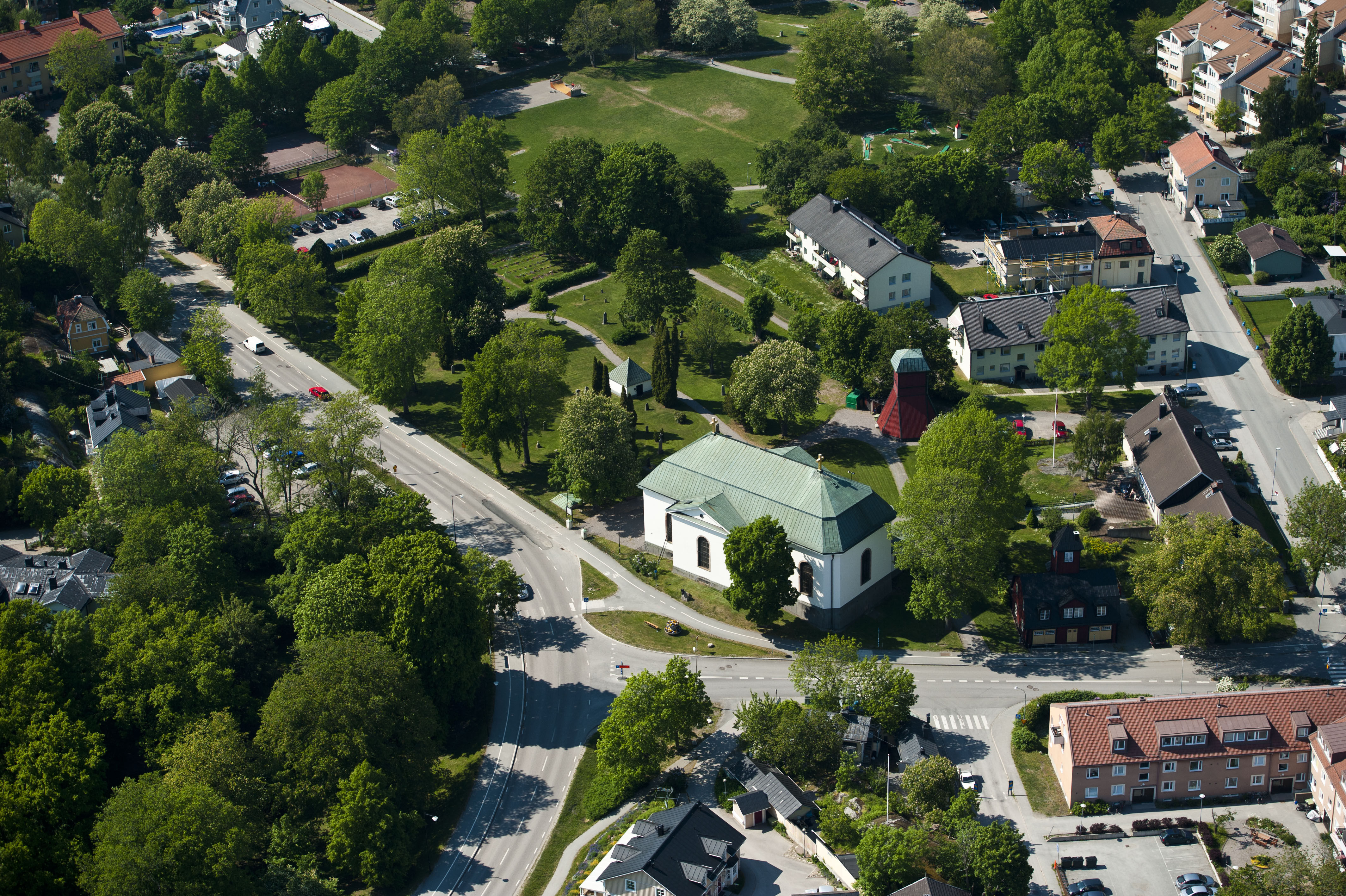 Vaxholms kyrka. Länsväg 274 går förbi söder om kyrkan.